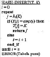 Hash_insert